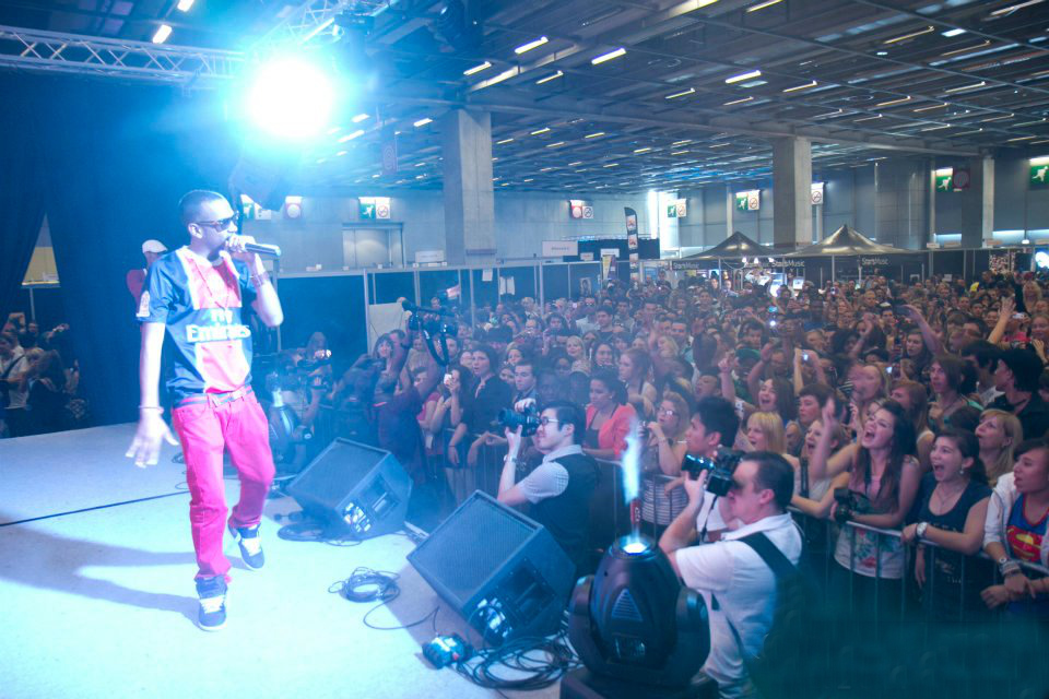 Le chanteur français Colonel Reyel sur scène lors de Music Expo 2011.